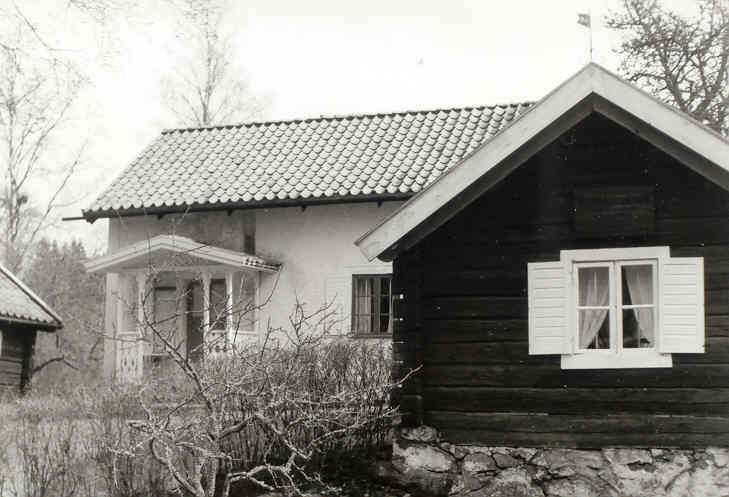 Nubbekullen i Västra Ny socken, våren 1992. Födelsehem för August Malmström. En bild tagen av Harri Blomberg.